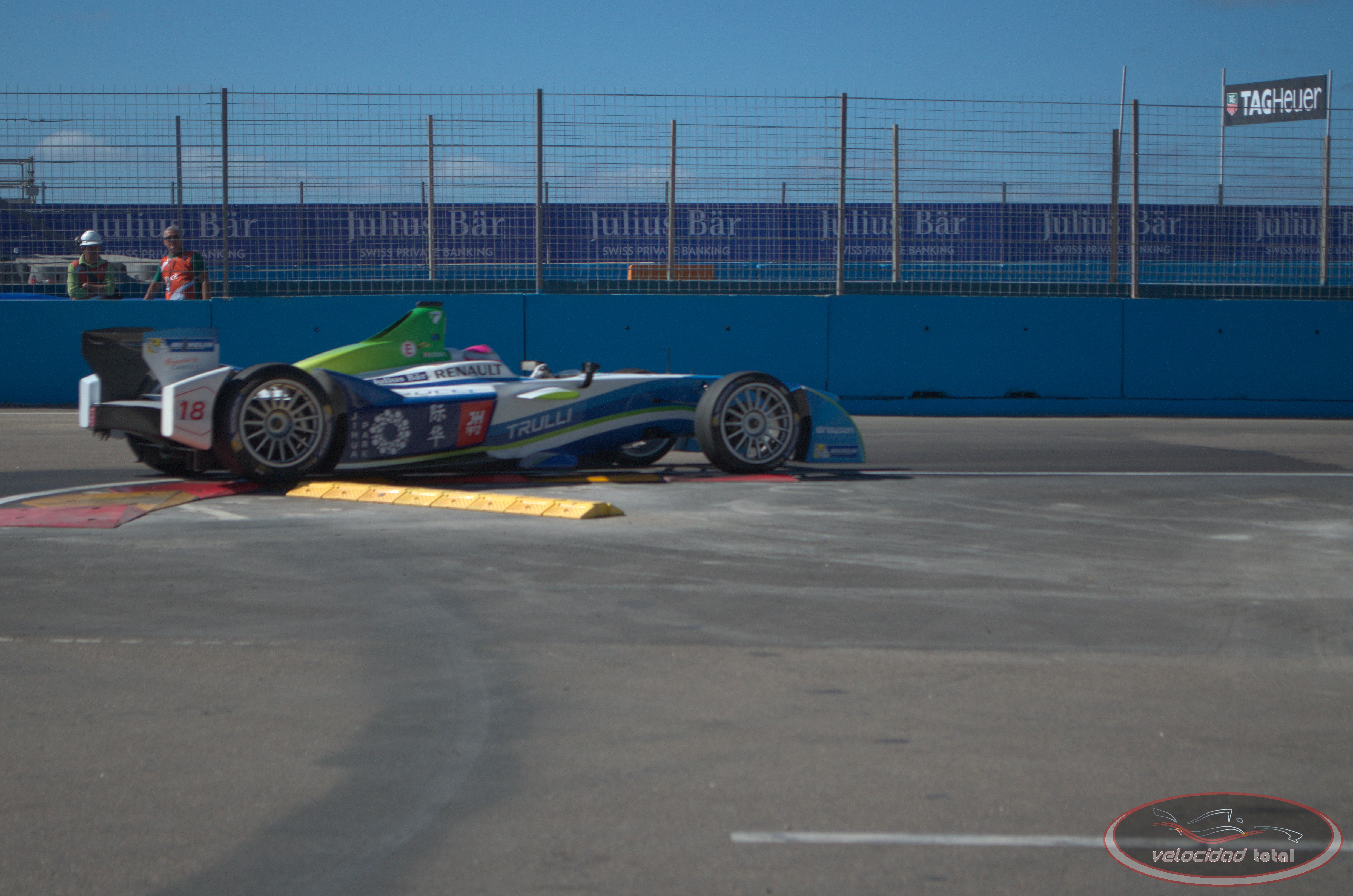 Solo se permite el uso de esta imagen mencionando a Velocidad Total como su autor. Imagen del equipo Trulli de Fórmula E, durante el Punta del Este ePrix de 2014.